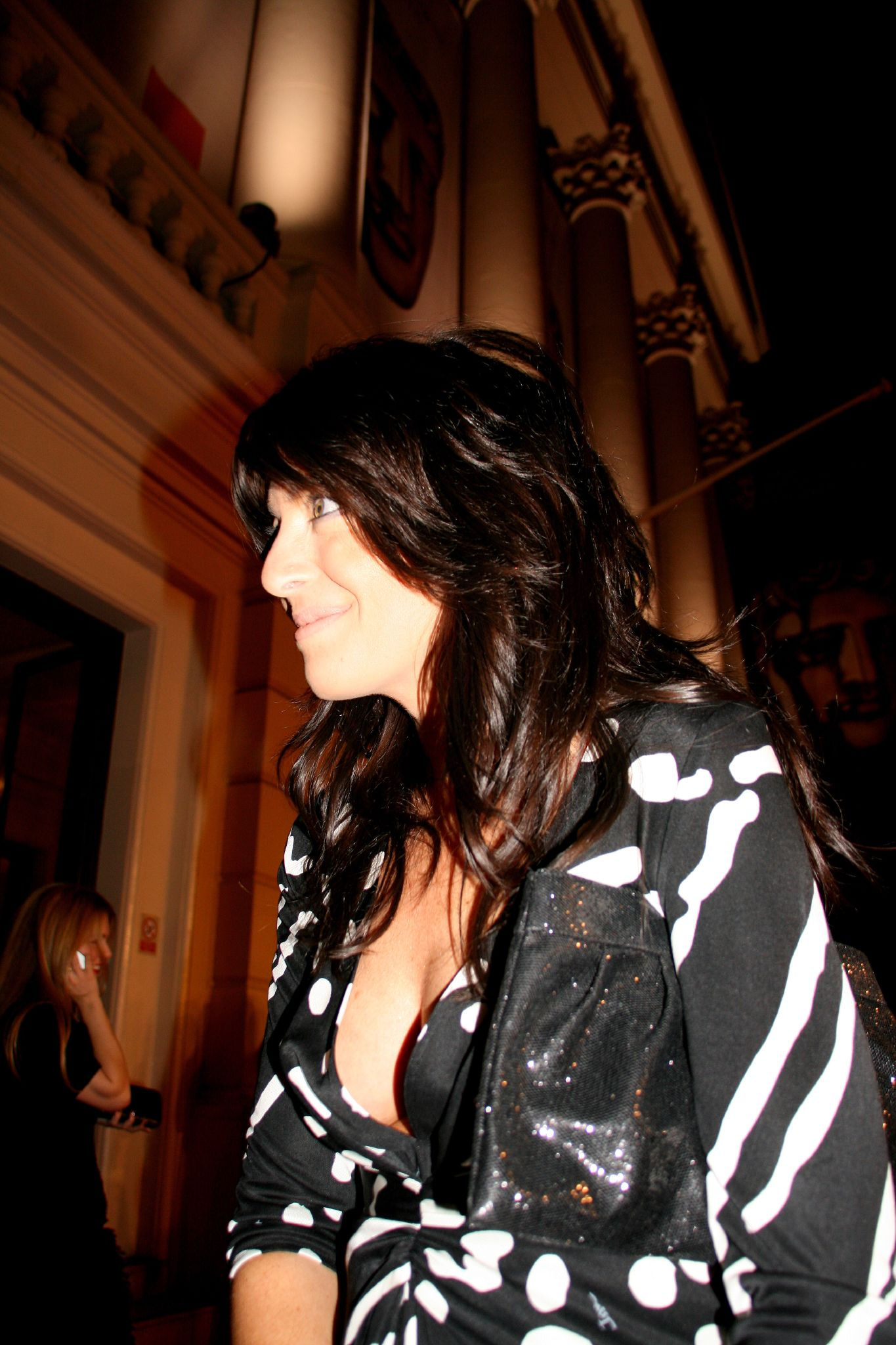 Claudia Winkleman, apresentadora de 2007 e 2008.